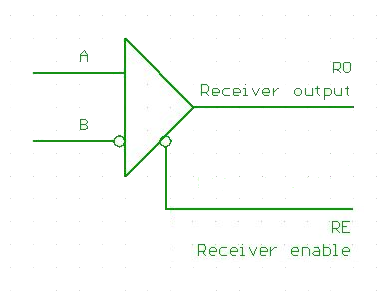 differentieller Receiver mit enable